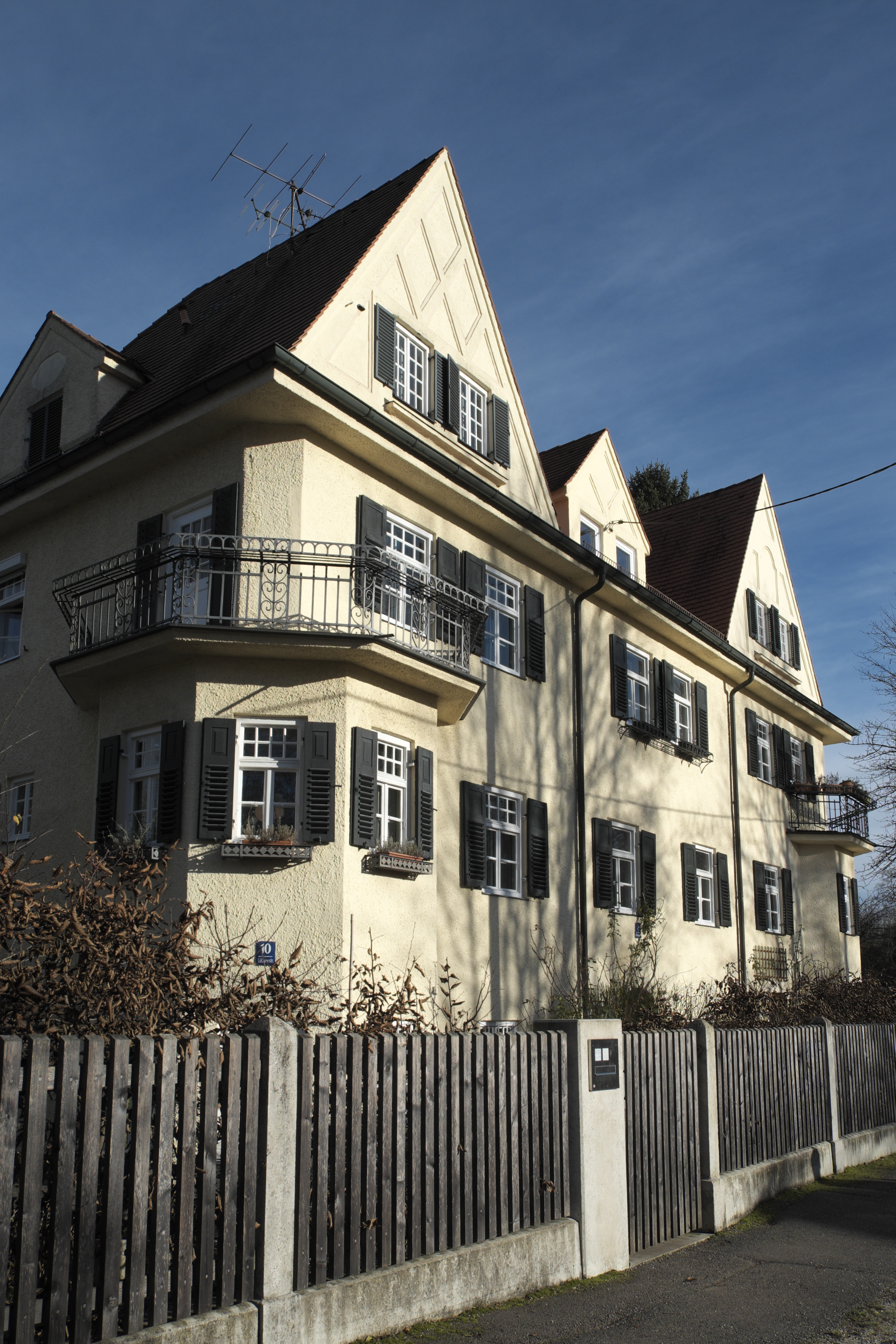 Wohnhausgruppe in der Lützowstraße 6-10 in Obermenzing im Stadtbezirk Pasing-Obermenzing in München (Bayern/Deutschland)